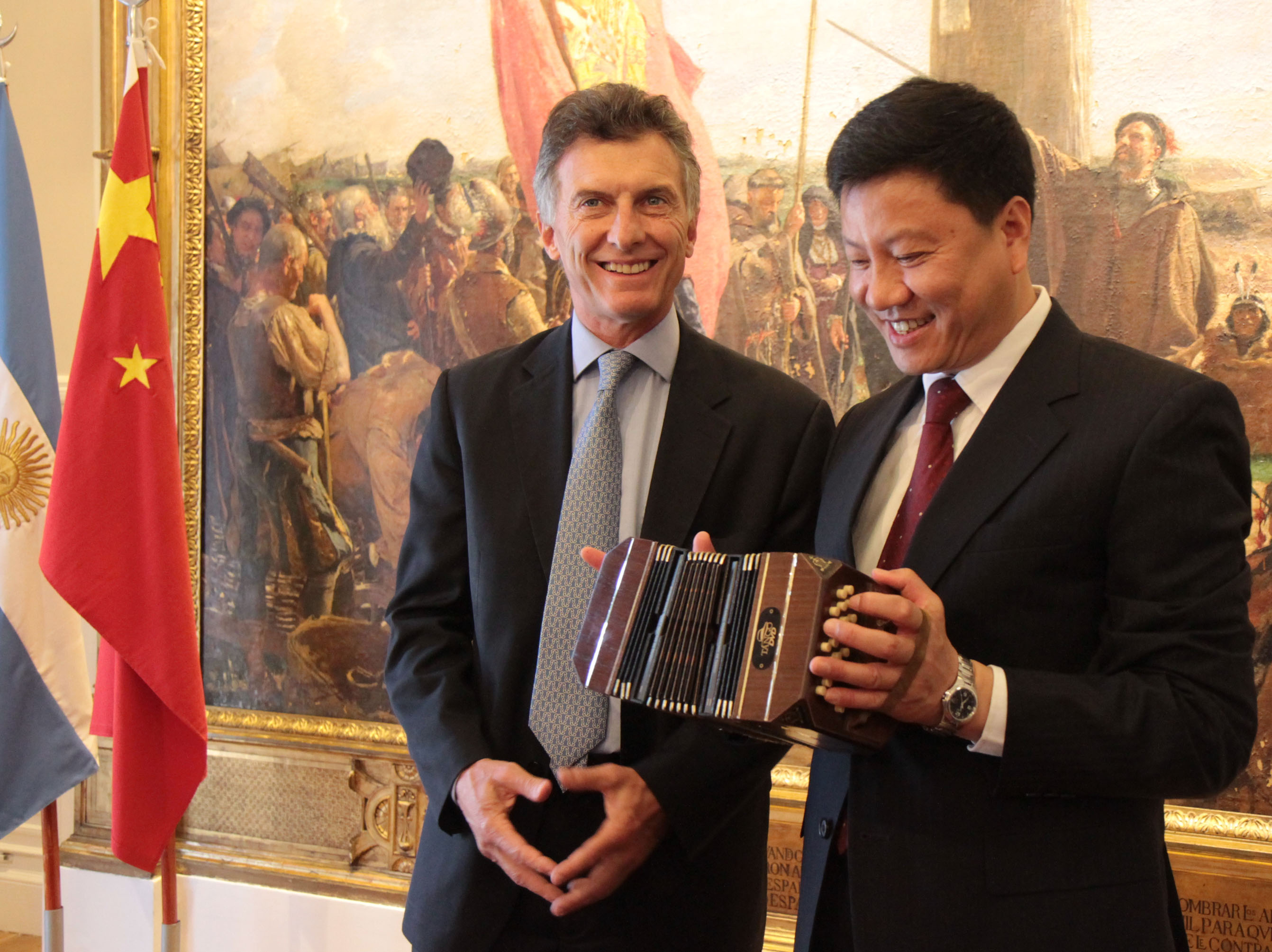 Buenos Aires. Abril 16 de 2012. El jefe de Gobierno de la ciudad de Buenos Aires, Mauricio Macri, entrega un obsequio al alcalde de la ciudad china de Guangzhou, Chen Jianhua, a quien recibió hoy en la sede del palacio comunal. Foto Mariana Sapriza-gv/GCBA.